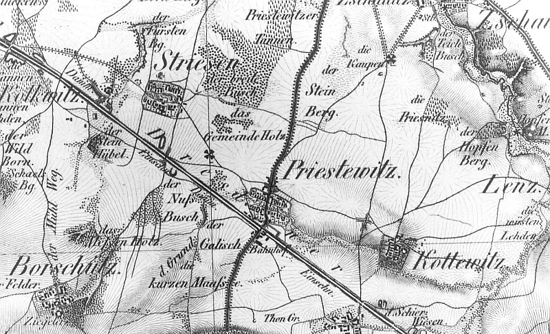 Original image description from the Deutsche Fotothek Priestewitz-Strießen. Oberreit, Sect. Großenhain, 1841/43